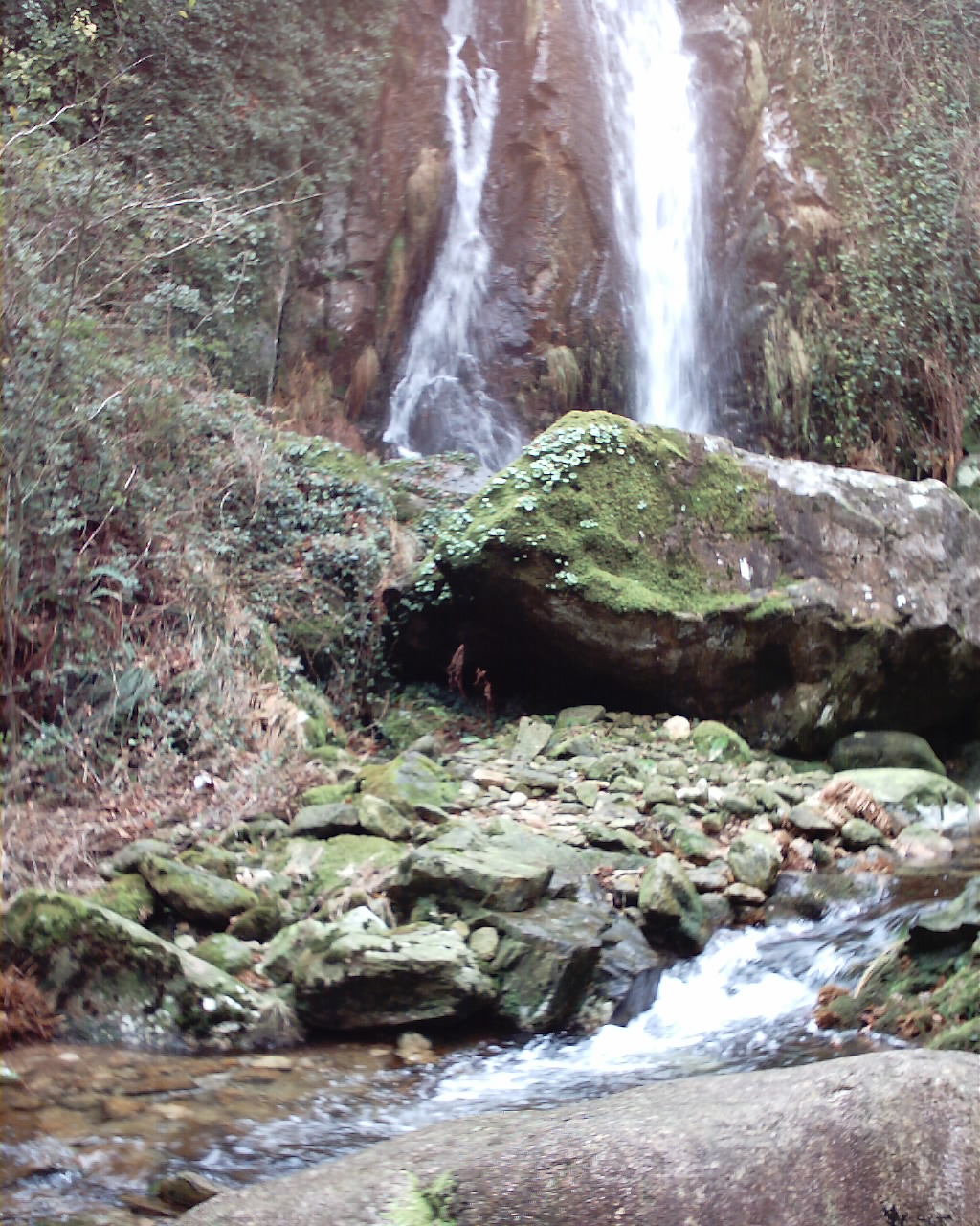 Vista da Fervenza de Pedrafigueira (Pedrafigueira waterfall)